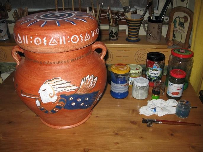 Lubis Urne, gestaltet von der Erfurter Künstlerin Jana Rabisch